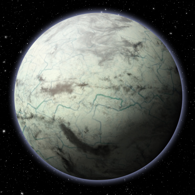 Impresión artística de Kapteyn b